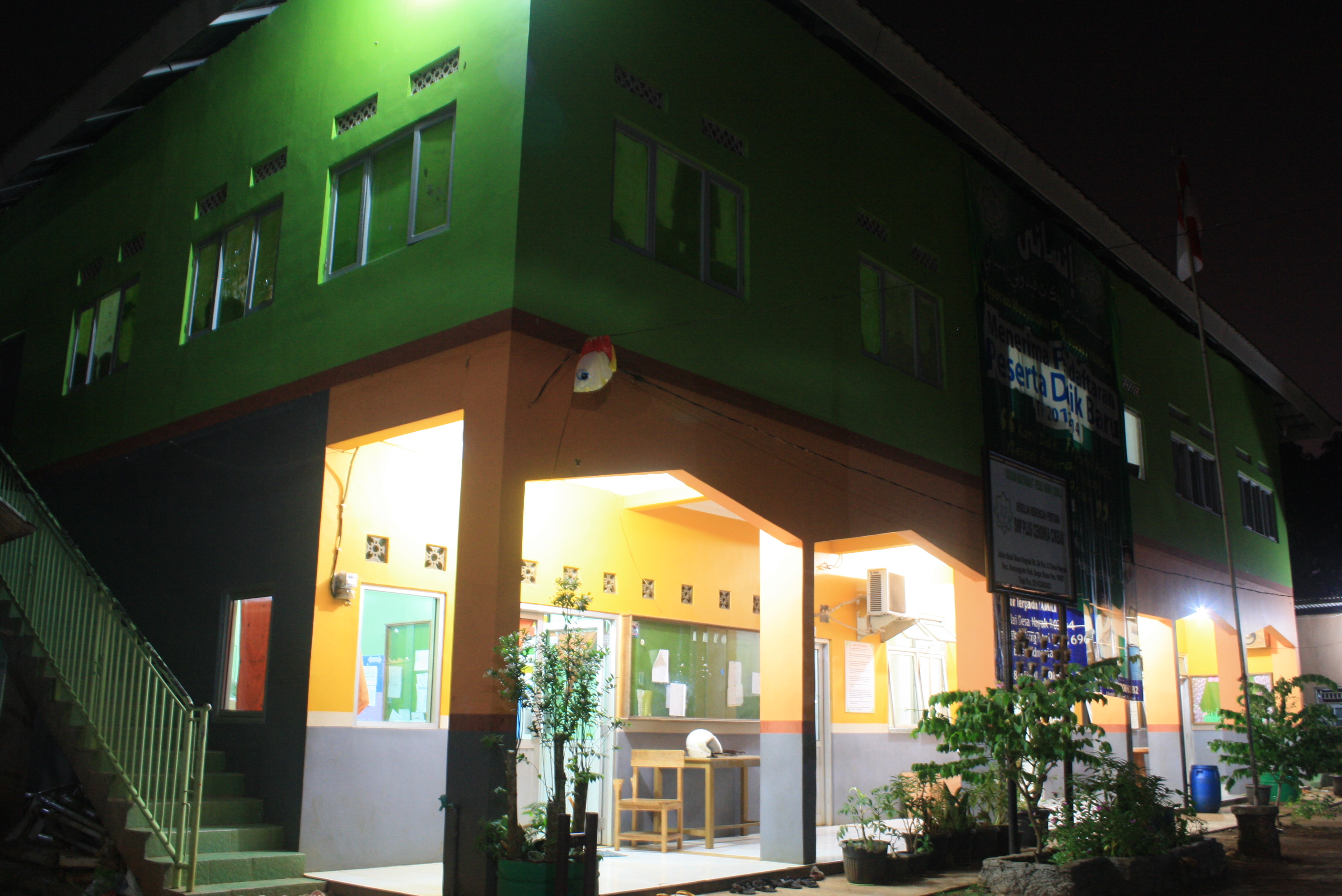 Gedung Utama SMP - SMA PLUS Cendikia Cikeas